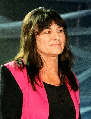 Mira Kubasińska podczas koncertu "Rzeka dzieciństwa".